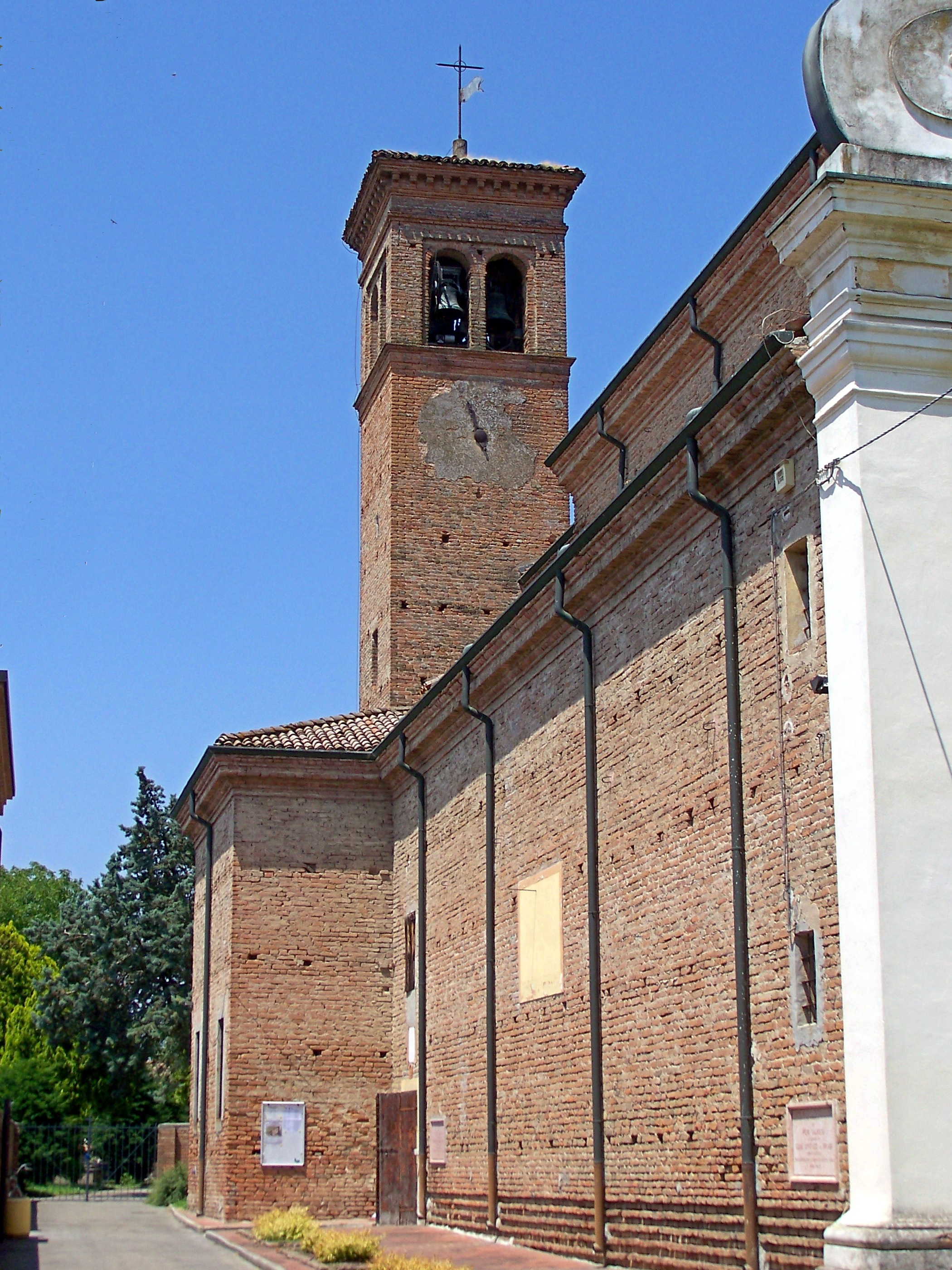 Il campanile in stile romanico della chiesa di Santa Maria Annunziata a Pieve Saliceto